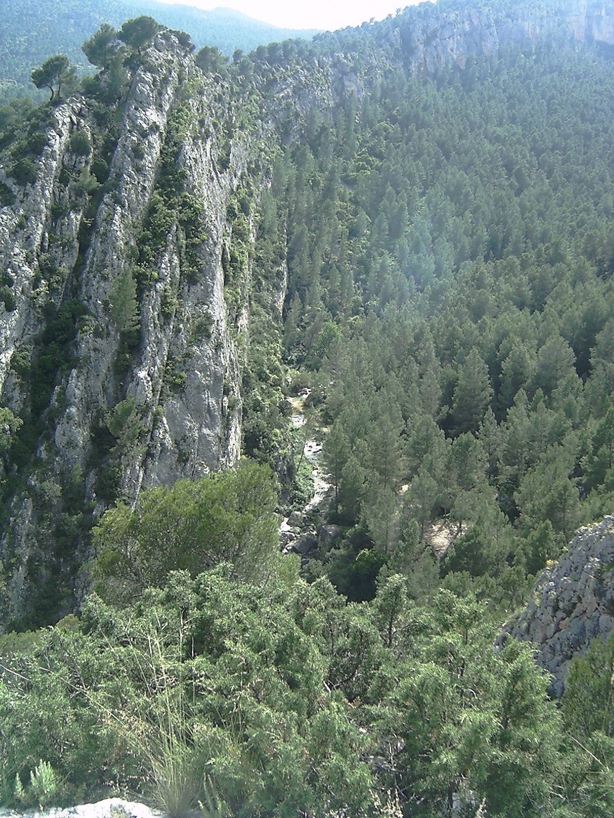 Moratalla, Murcia, España. Río Alhárabe a su paso por el paraje de la Puerta. -- Moratalla, Murcia, Spain. River Alharabe. 2005. -- Own picture, given to PD.